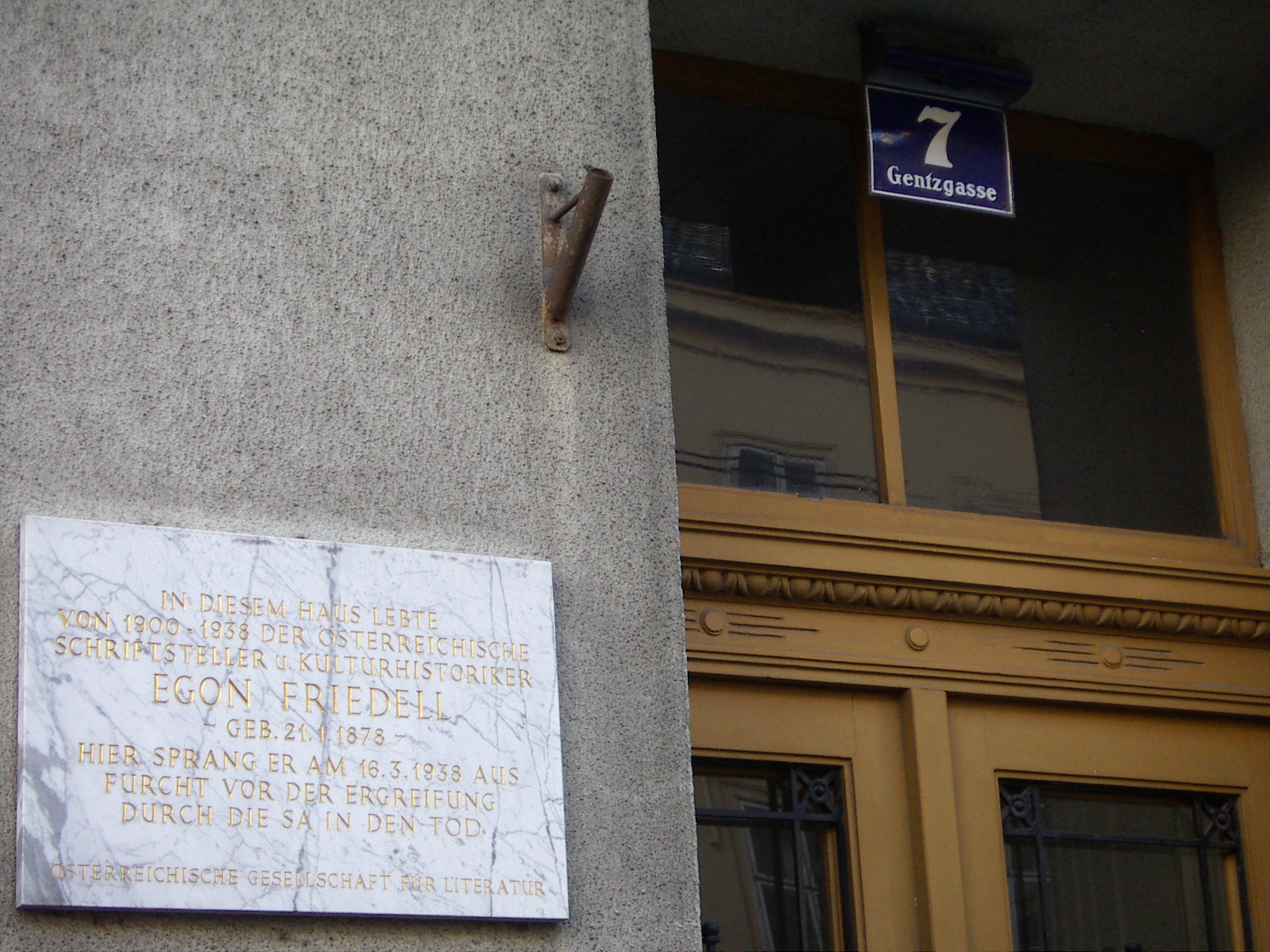 Gedenktafel für Egon Friedell in der Gentzgasse 7, Wien, wo er von 1900–1938 wohnte